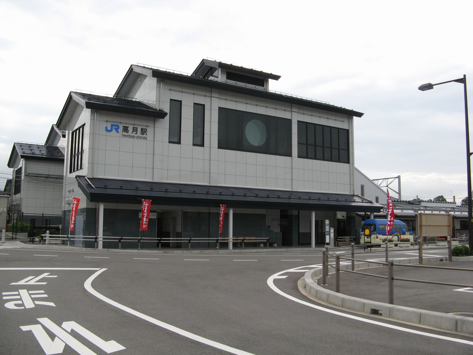 高月駅西口 右手奥に高月町コミュニティバス「高月観音号」が停車中